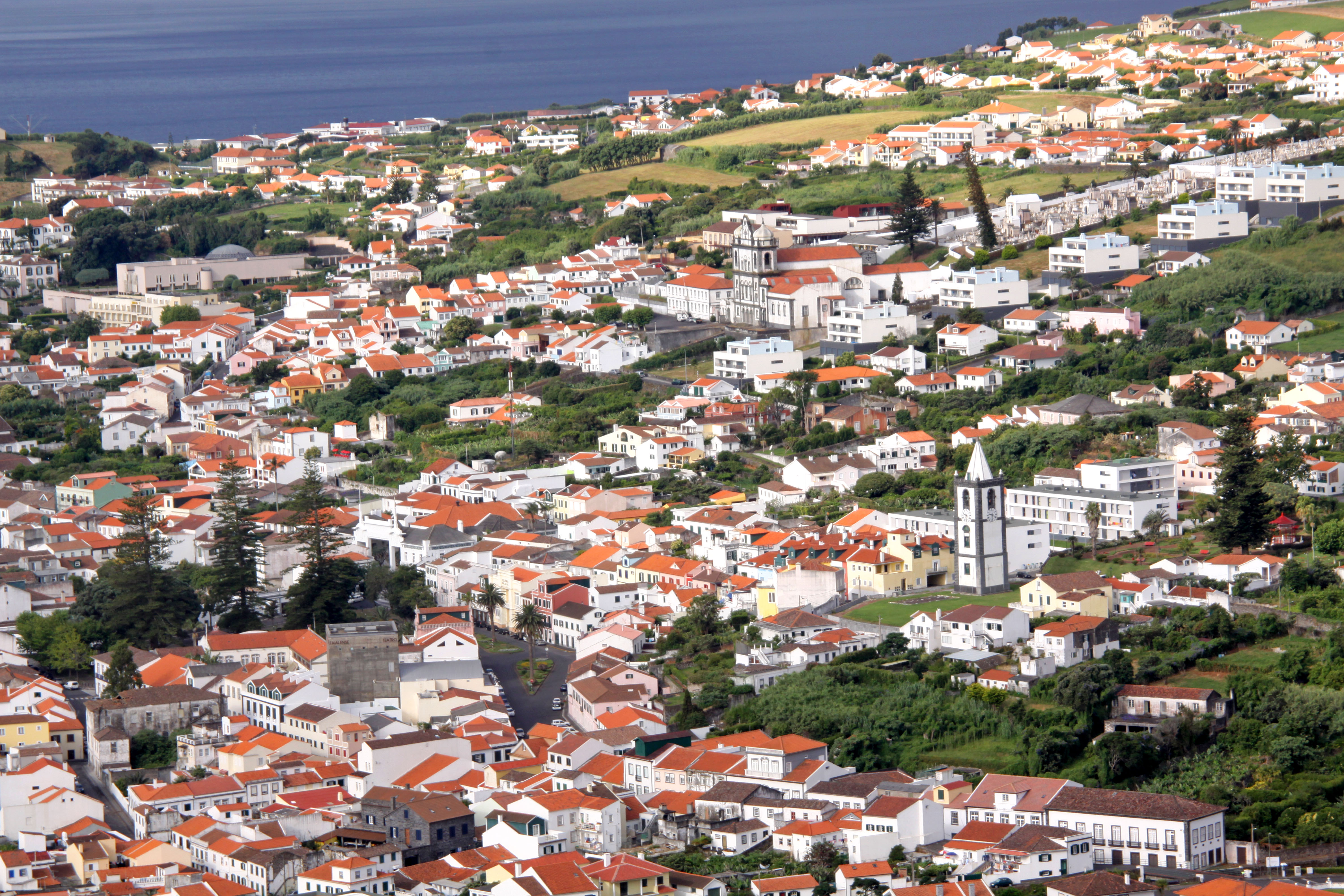 Ilha do Faial, Açores. Horta vue depuis la Ponta da Espalamaca.